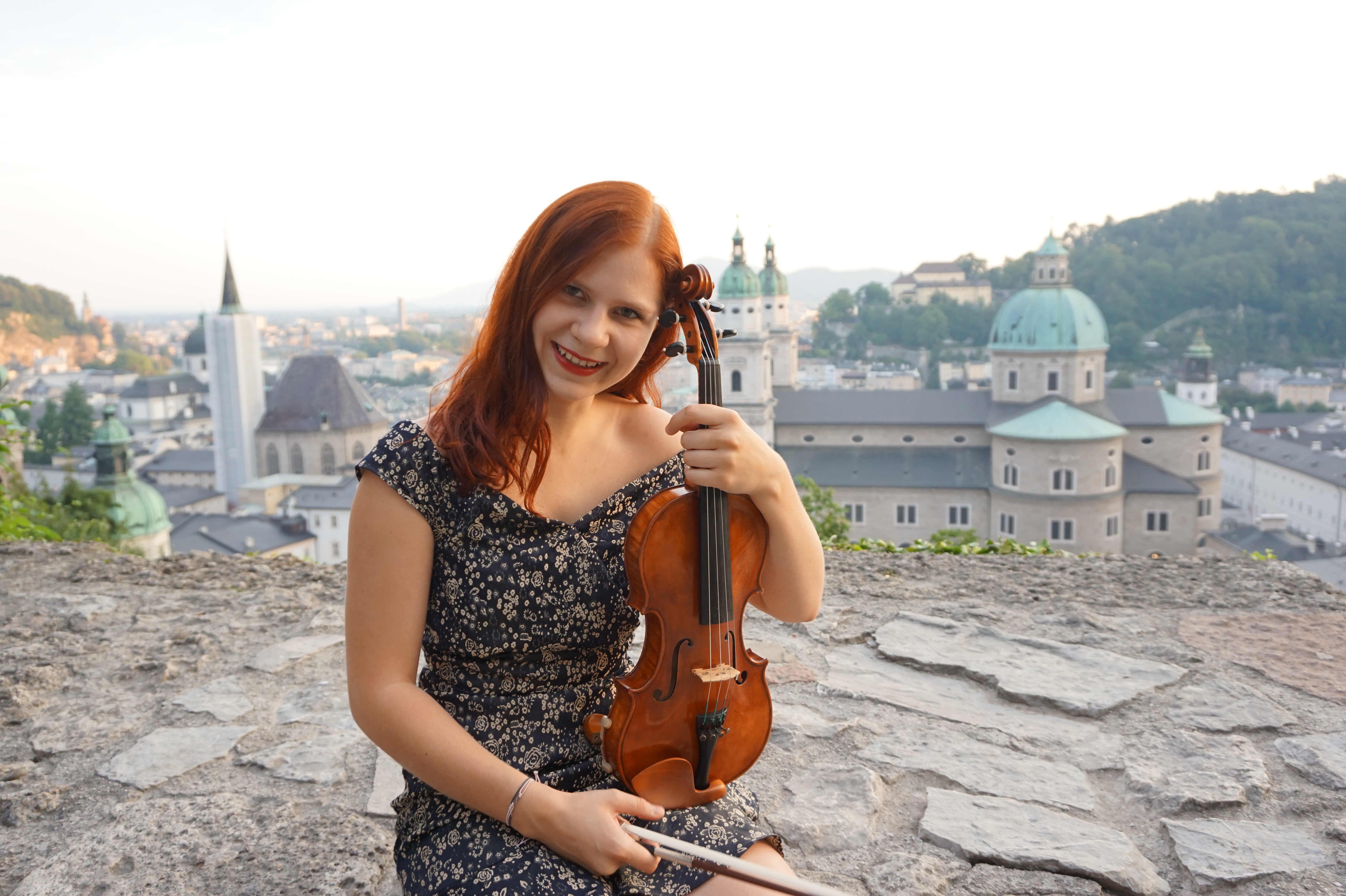 Martina Miedl in Salzburg